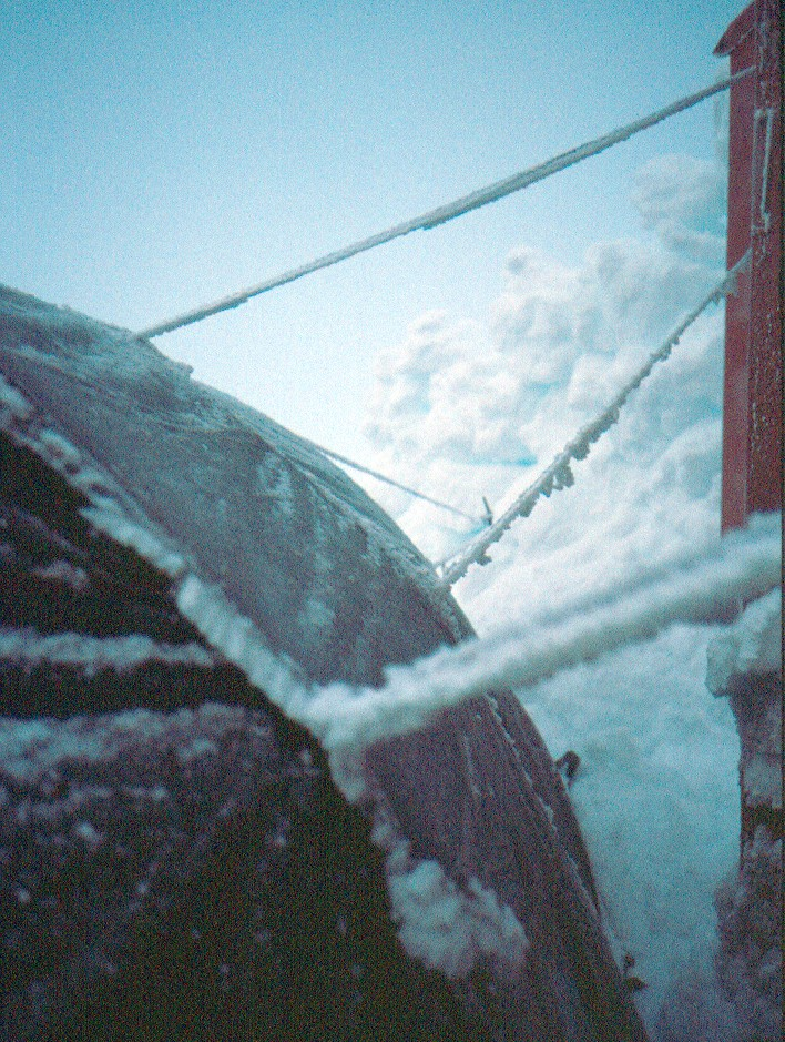 Dimfrost vid Pårteobservatoriet påsktid 2002. Fotograf: Pellaj, februari 2004.